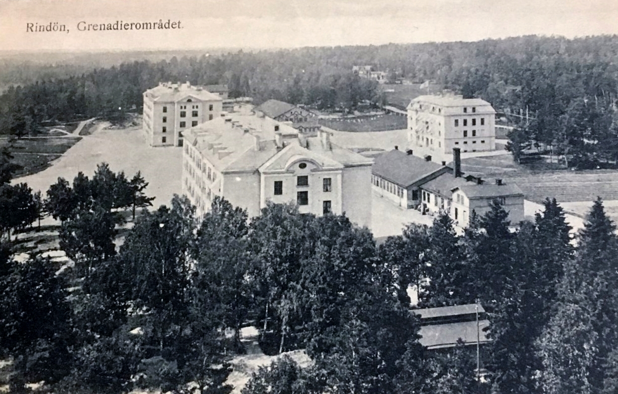 Vaxholms grenadjärregementes kasernområde på Rindö, Vaxholm. Från 1941 övertaget av Vaxholms kustartilleriregemente.